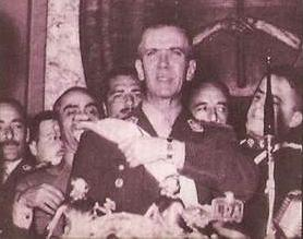 El efímero presidente de facto de la Argentina, General Eduardo Lonardi, pronunciando un discurso